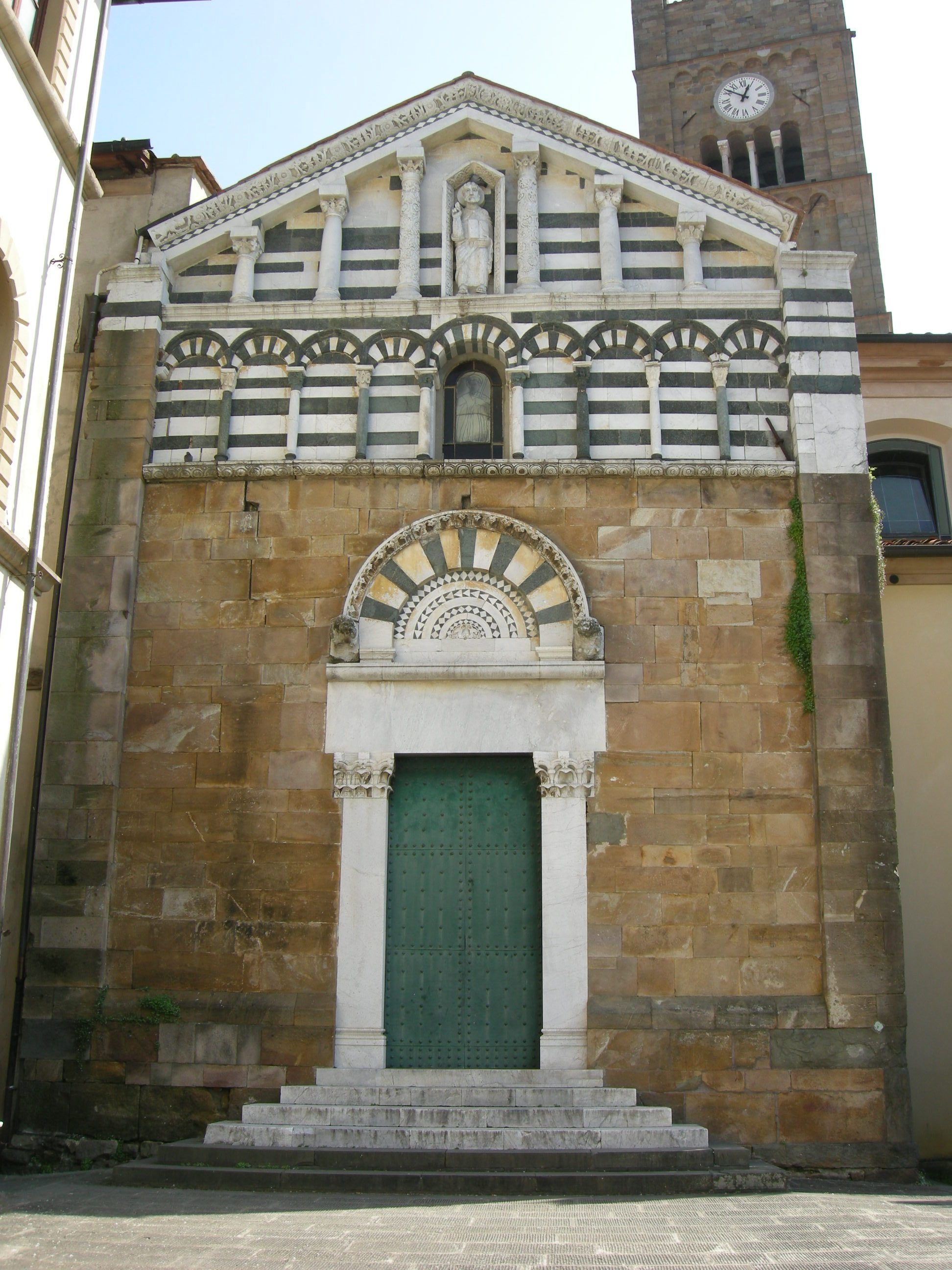 Altopascio, pieve di san jacopo